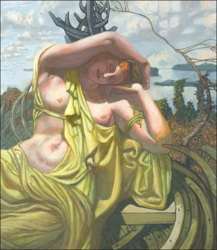 Станковая картина, холст,масло, авторская работа